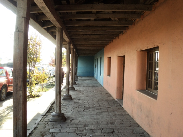 Casa con corredores, localidad de Palmilla, comuna de Linares.